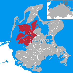 Amt Gingst, Landkreis Rügen, Mecklenburg-Vorpommern